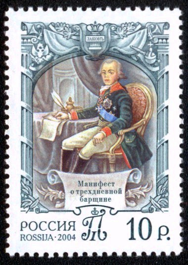 Почтовая марка «Павел I подписывает Манифест о трёхдневной барщине», из серии «250 лет со дня рождения Павла I, российского императора» (Россия, 2004 г.)